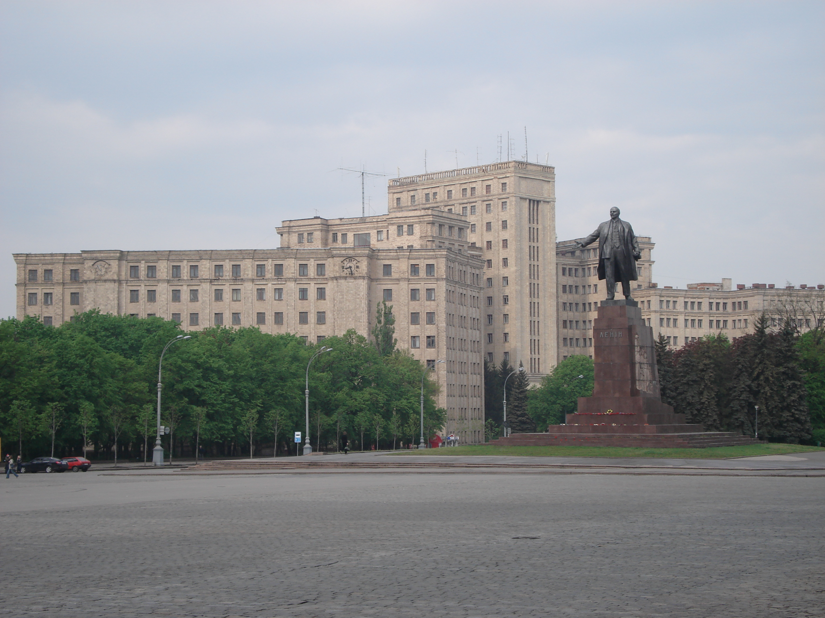 Photo d'une des plus grande place d'Europe